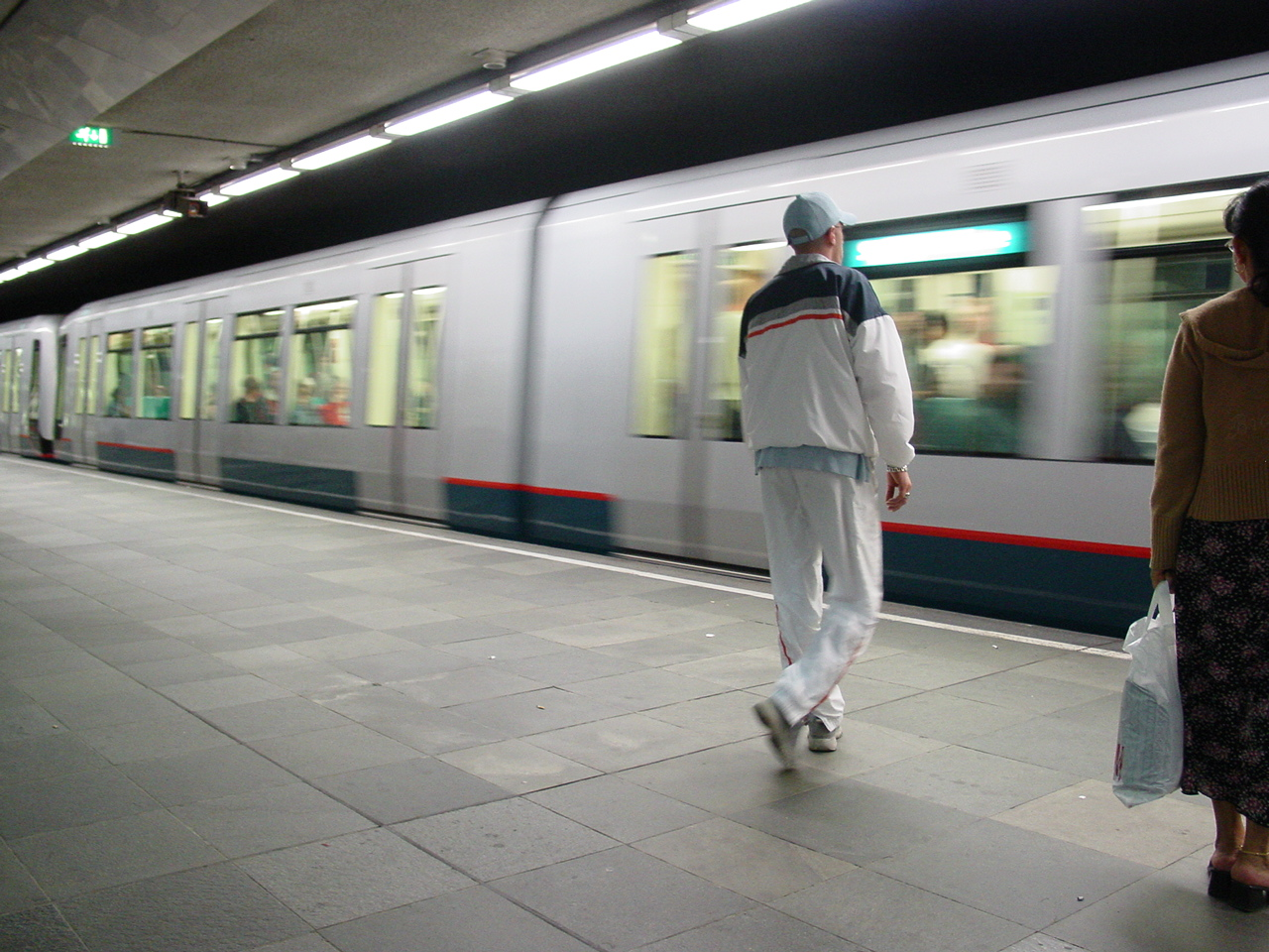 Afbeelding Rotterdamse metro.